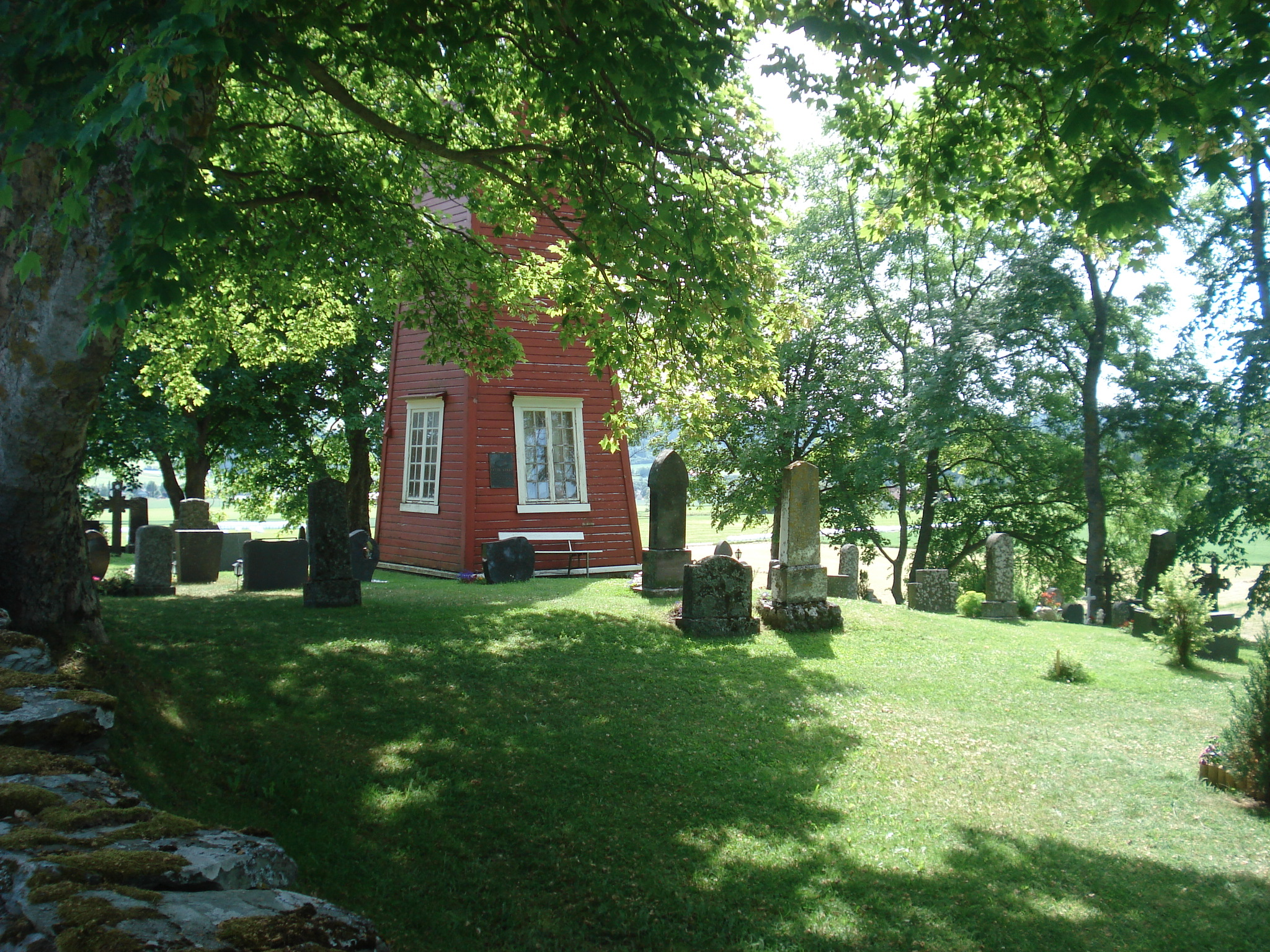 Gevik kirke, kirkested for Ekne.